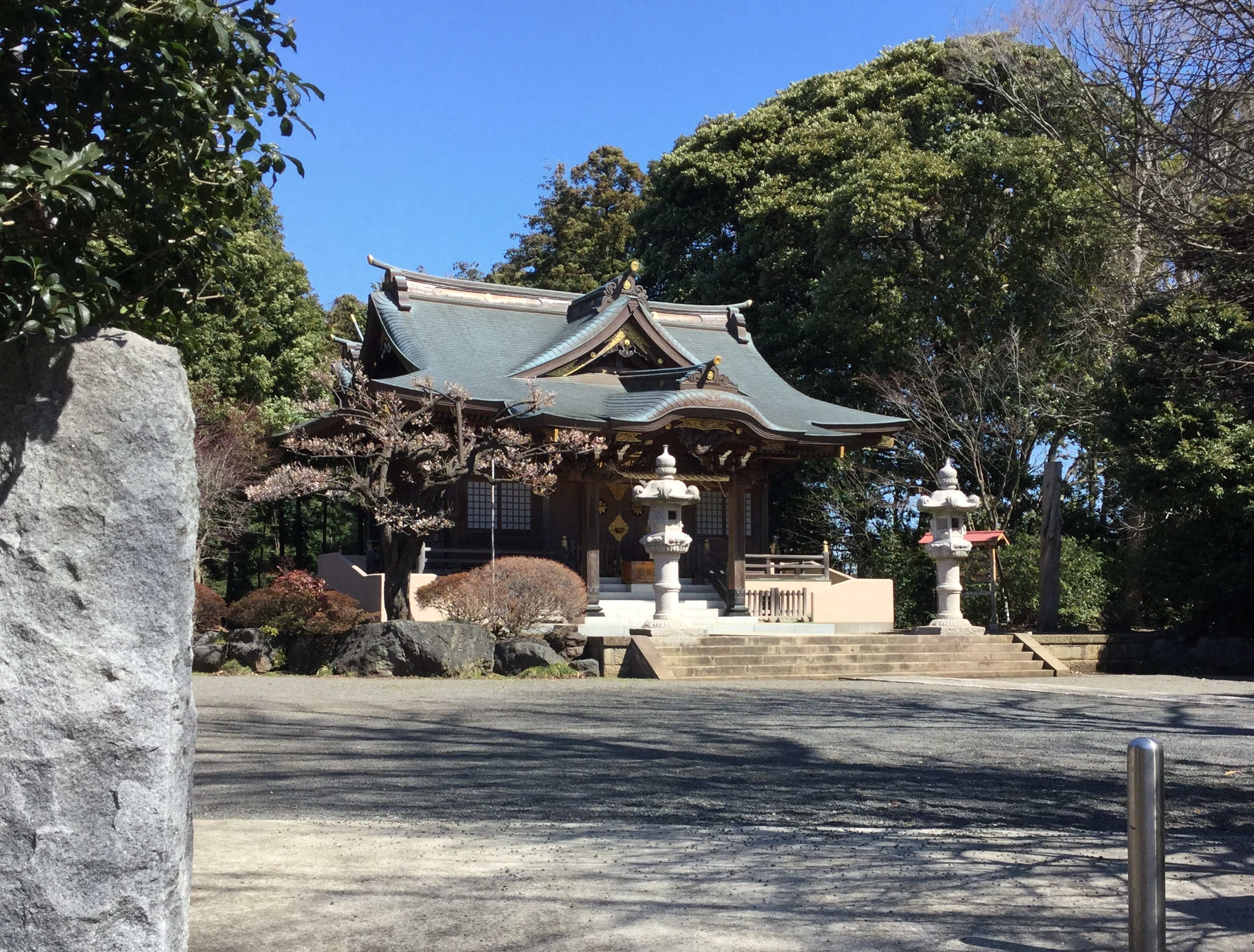 佐波神社（神奈川県藤沢市石川） 本殿